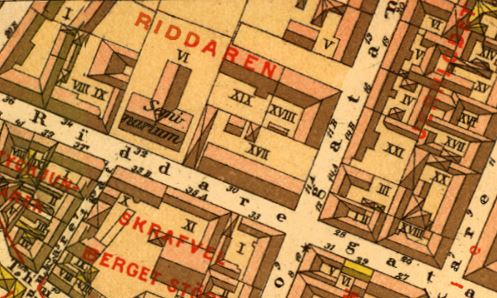 Del av A.R. Lundgrens Stockholmskarta visande Riddaren 17